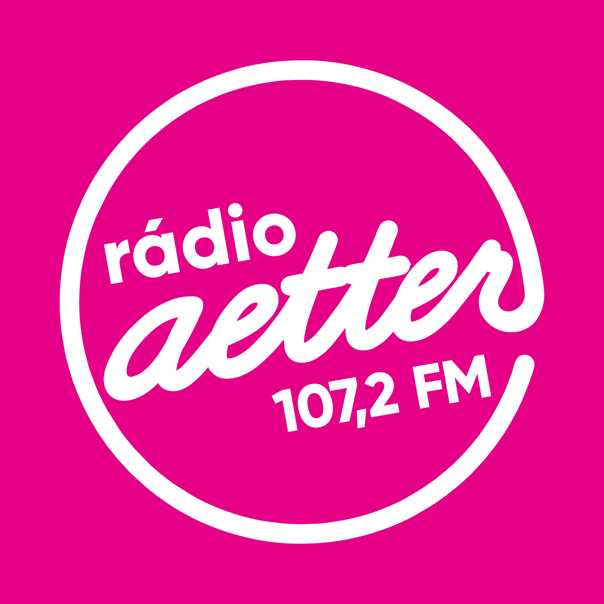 Súčasné logo Rádia aetter používané od roku 2020